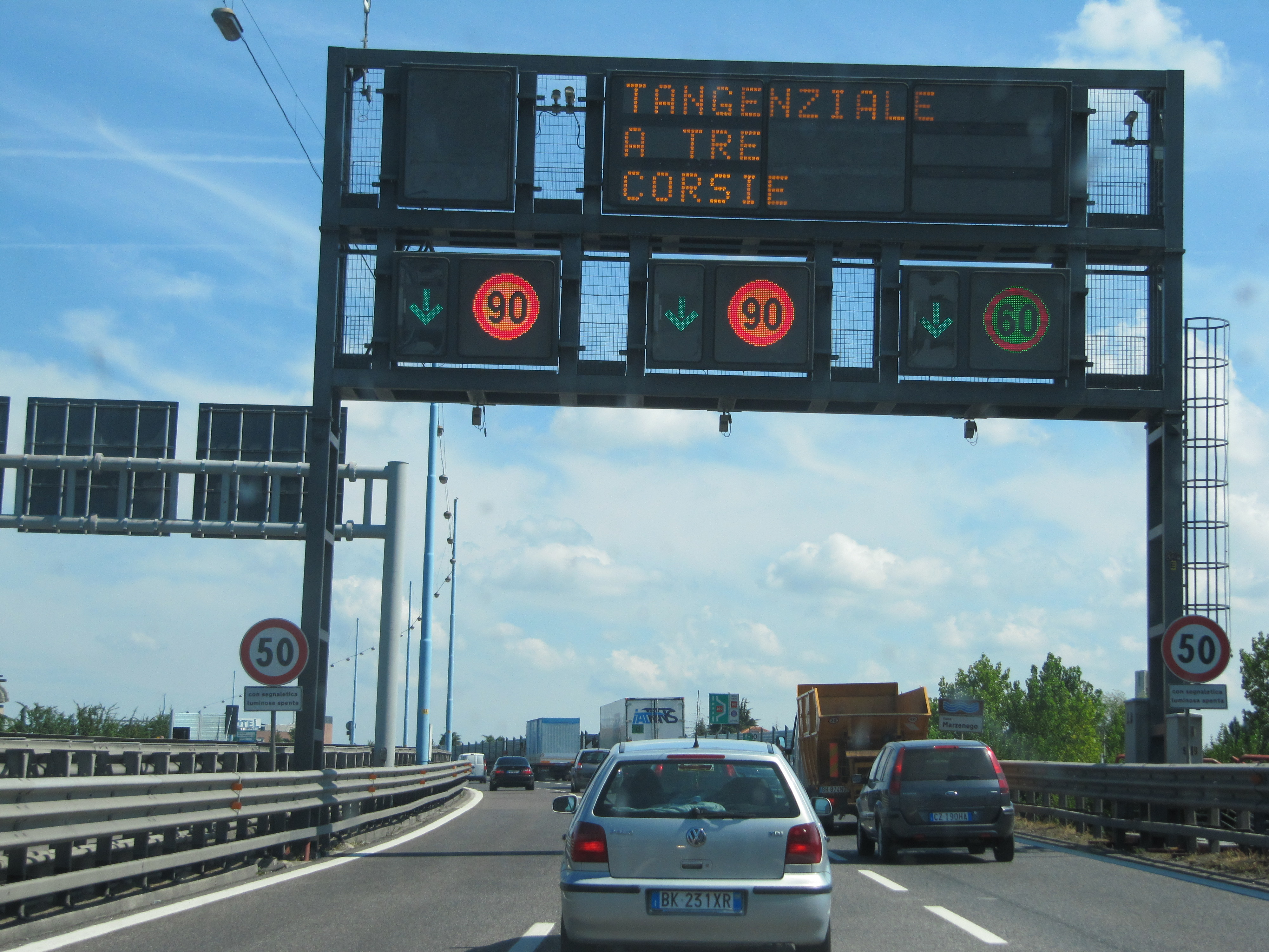 A57 (Italia) 1